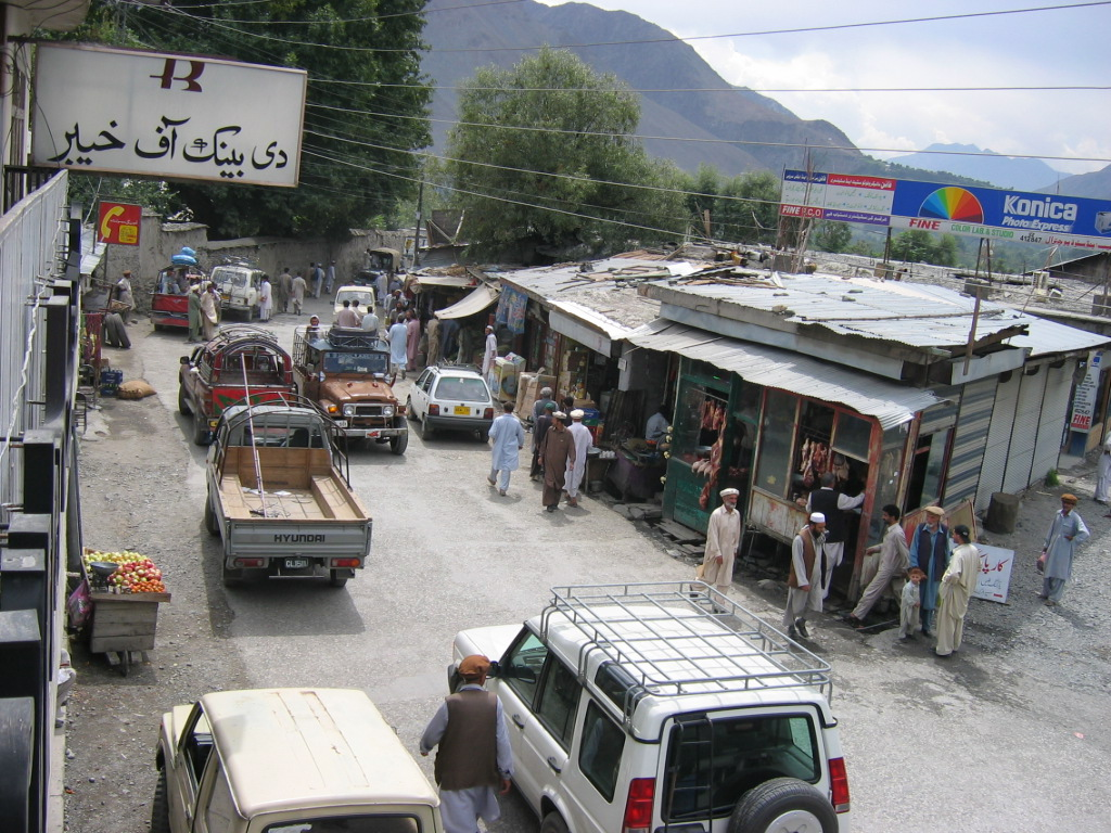 Chitral bazaar